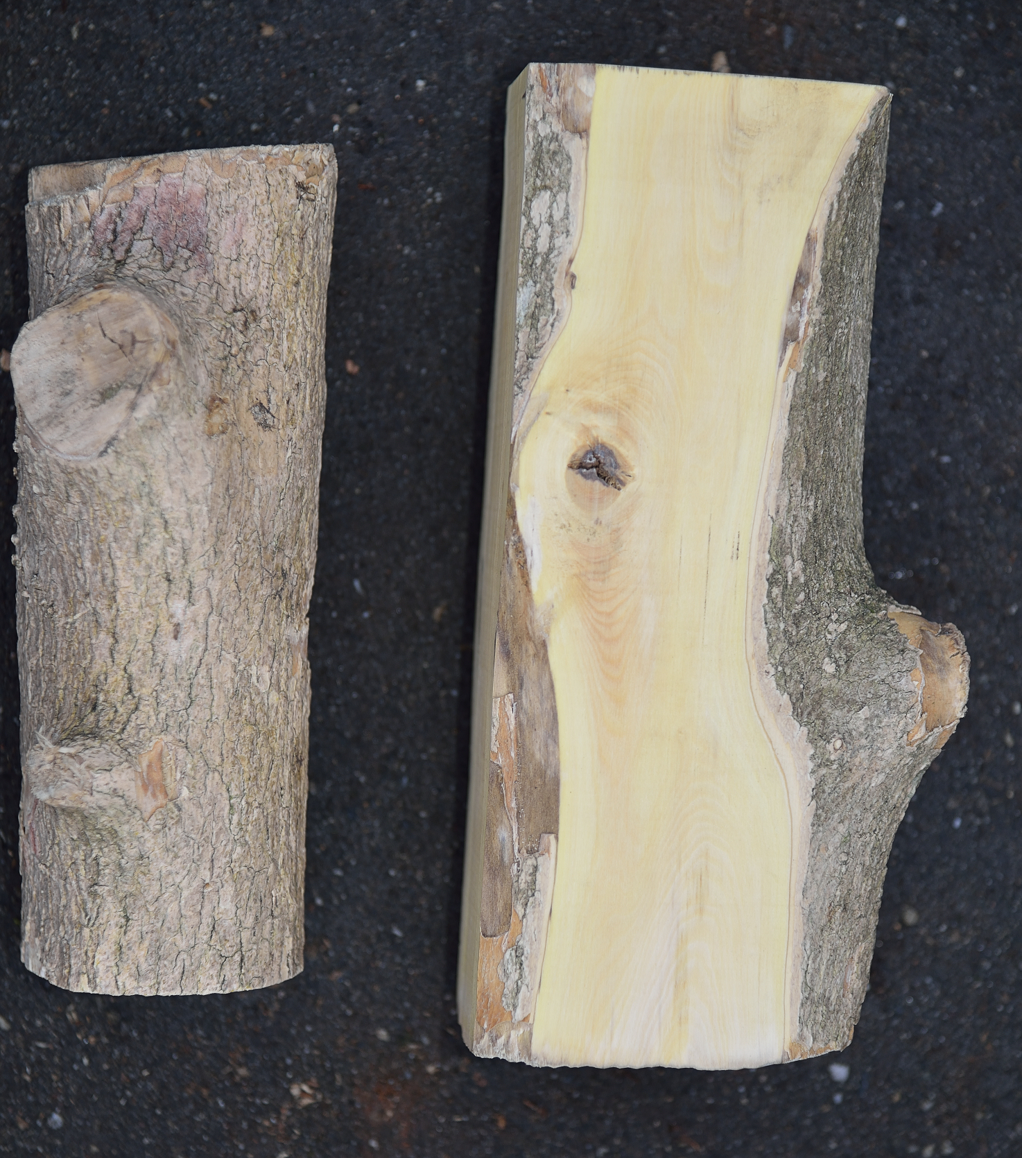 Buxus sempervirens, palmhout